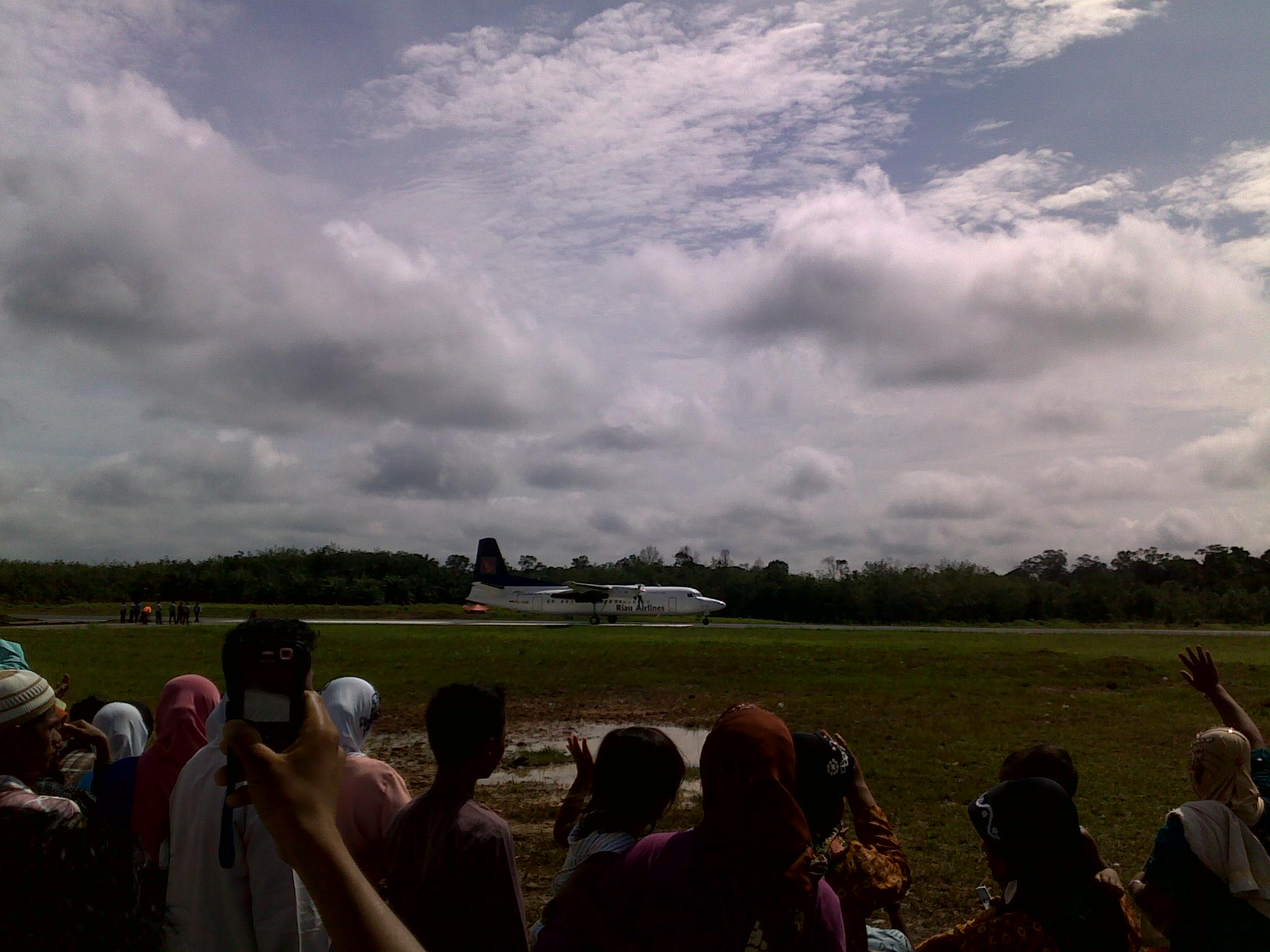 Bandara Tuanku Tambusai Rokan Hulu